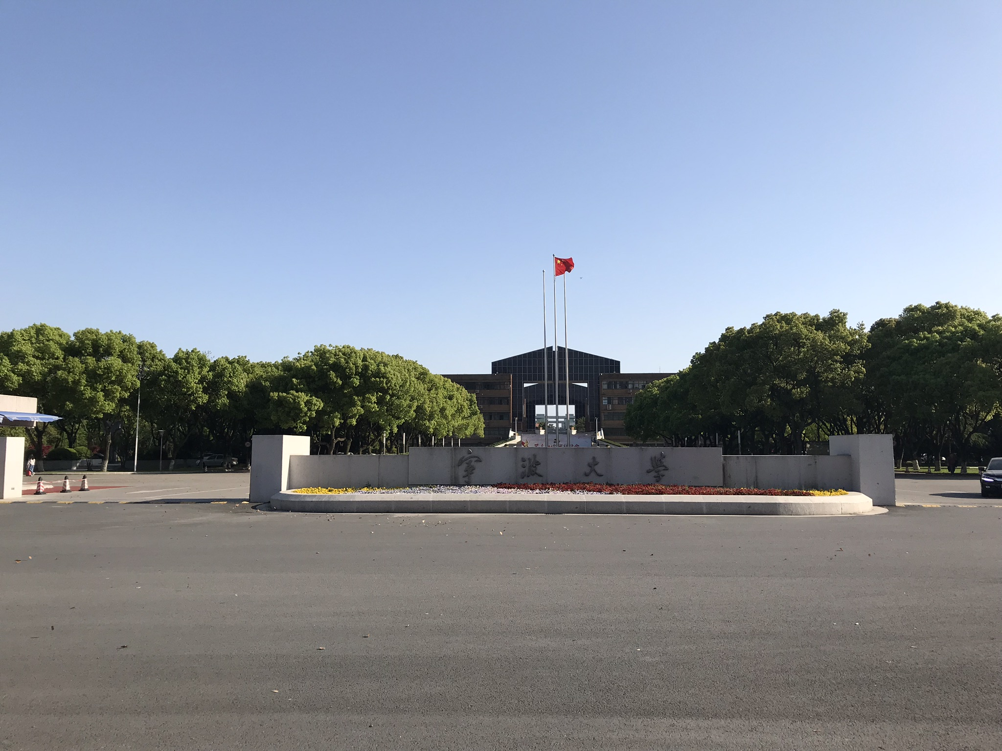 中文（中国大陆）: 宁波大学正门